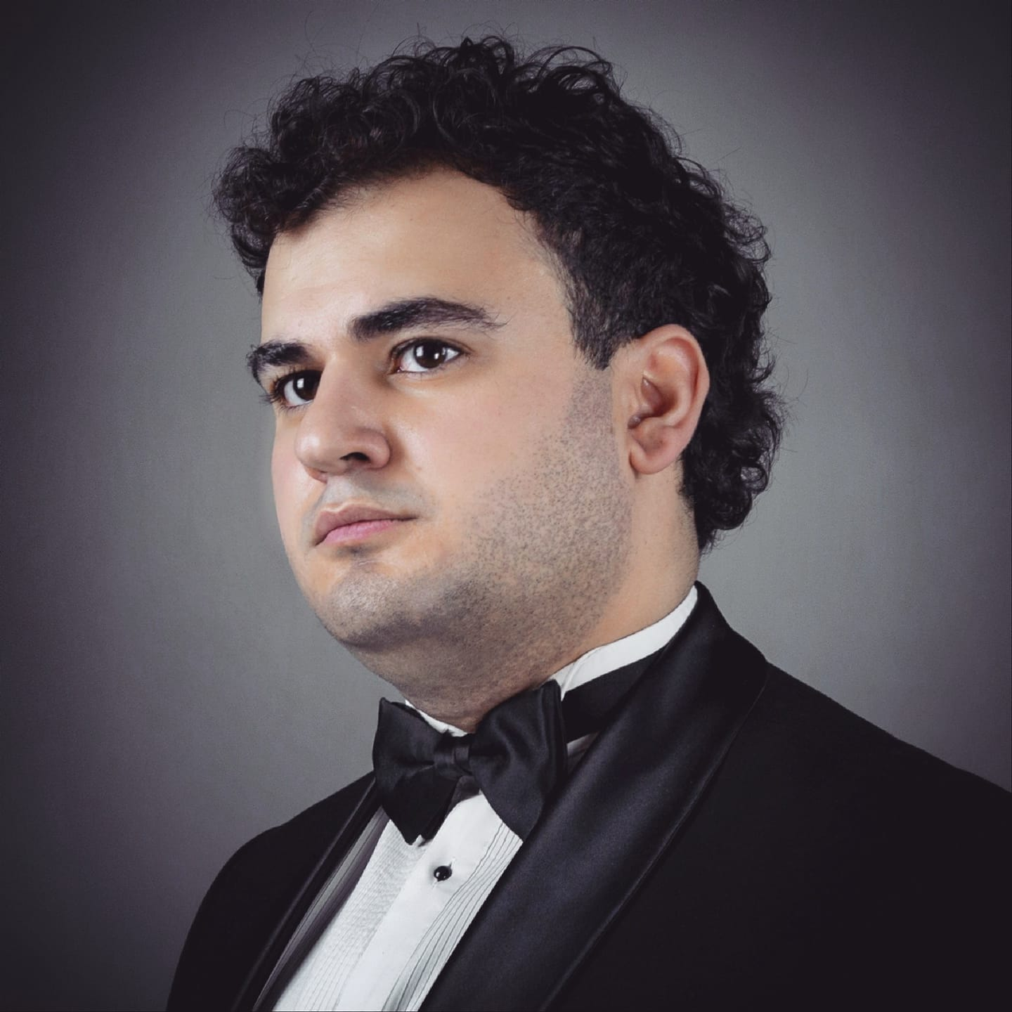 Տիգրան Մելքոնյան, Տենոր